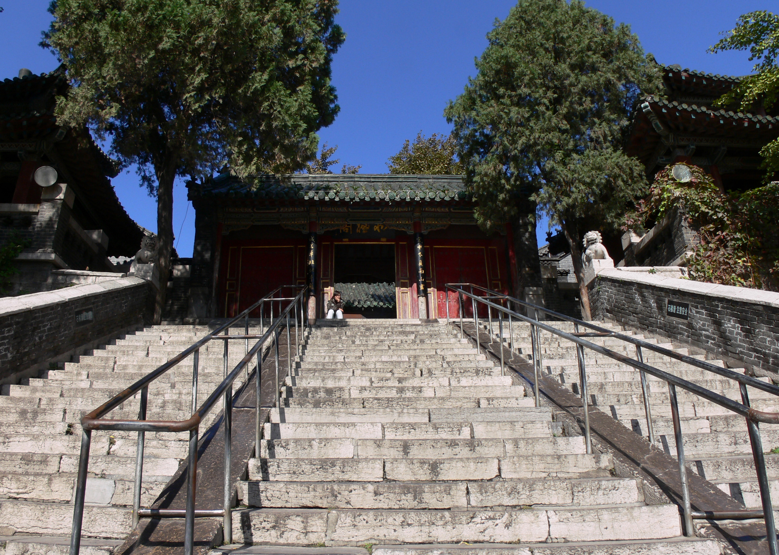 济南大明湖公园北极阁